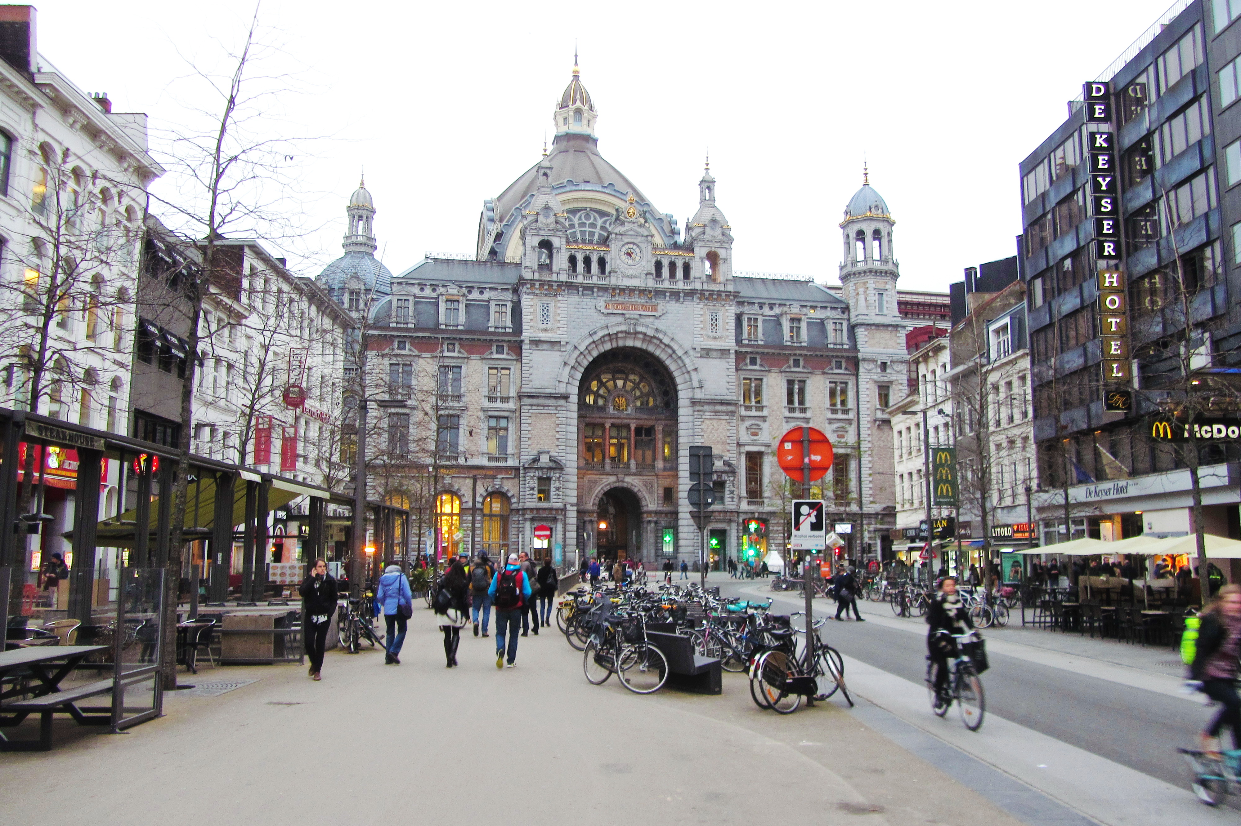 Dworzec kolejowy w Antwerpii. zdjęcie wykonane pod koniec 2017